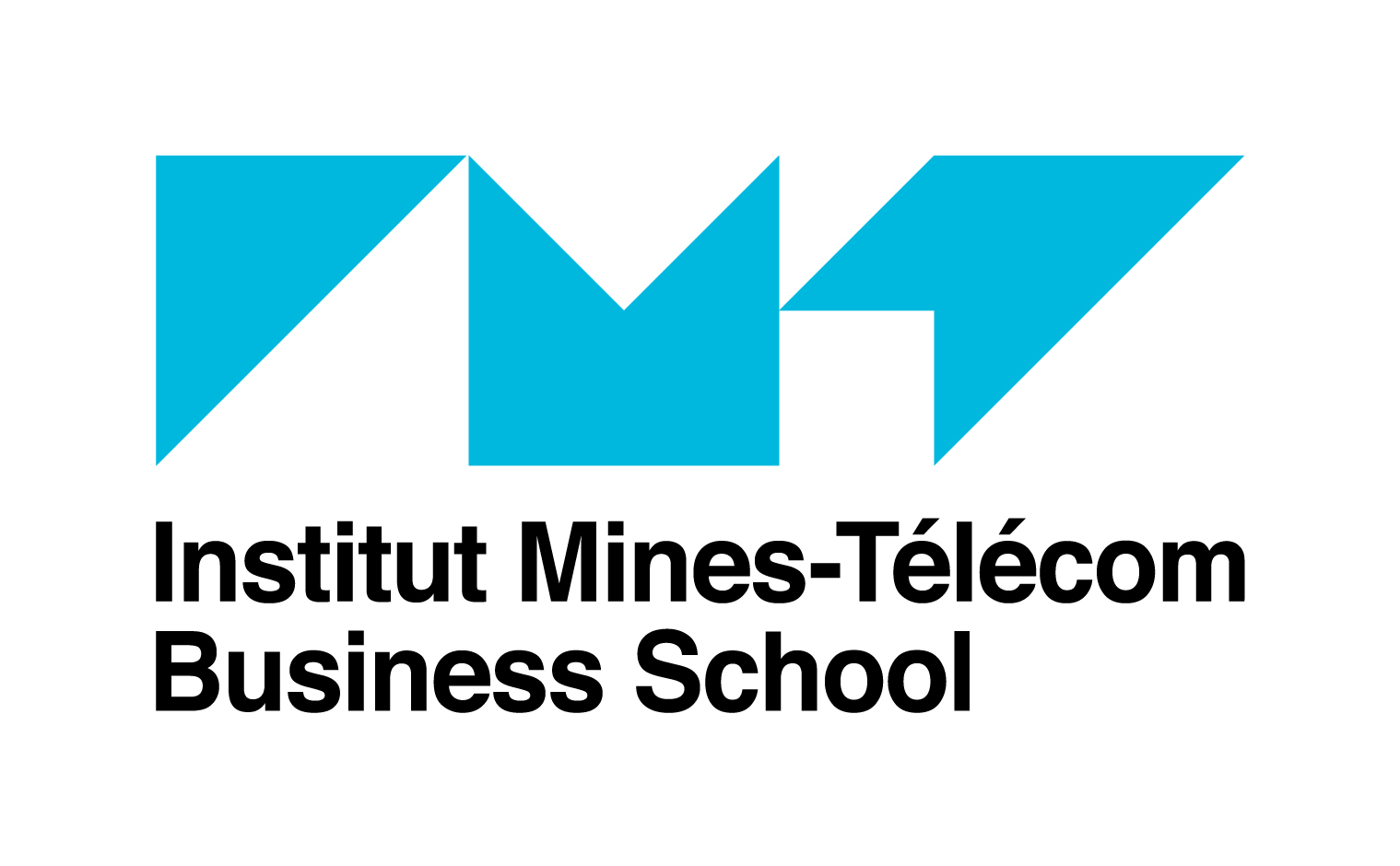 Logo Institut Mines-Télécom Business School anciennement Télécom Ecole de Management